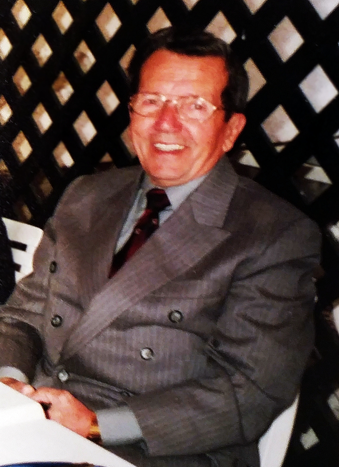 János Haraszti at 2003